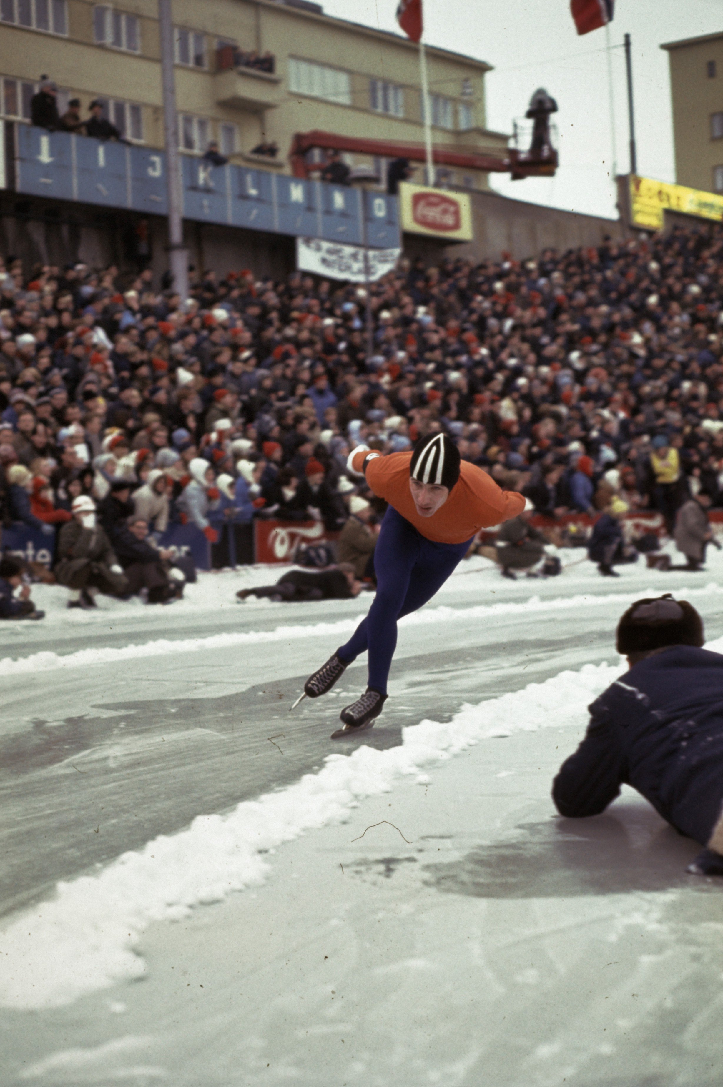 Collectie / Archief : Fotocollectie Anefo Reportage / Serie : [ onbekend ] Beschrijving : sport, schaatsen, Kees Verkerk Datum : ongedateerd Trefwoorden : schaatsen, sport Persoonsnaam : Kees Verkerk Fotograaf : Fotograaf Onbekend / Anefo Auteursrechthebbende : Nationaal Archief Materiaalsoort : Dia (kleur) Nummer archiefinventaris : bekijk toegang 2.24.01.06 Bestanddeelnummer : 254-7737